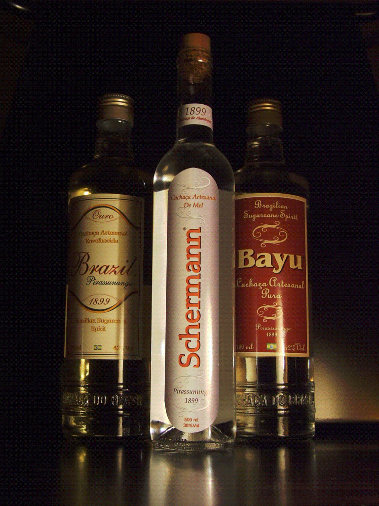 Brazilian Artisanal Cachaças